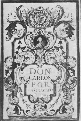 Real Cédula creating Mateo de Toro y Zambrano Count of la Conquista.